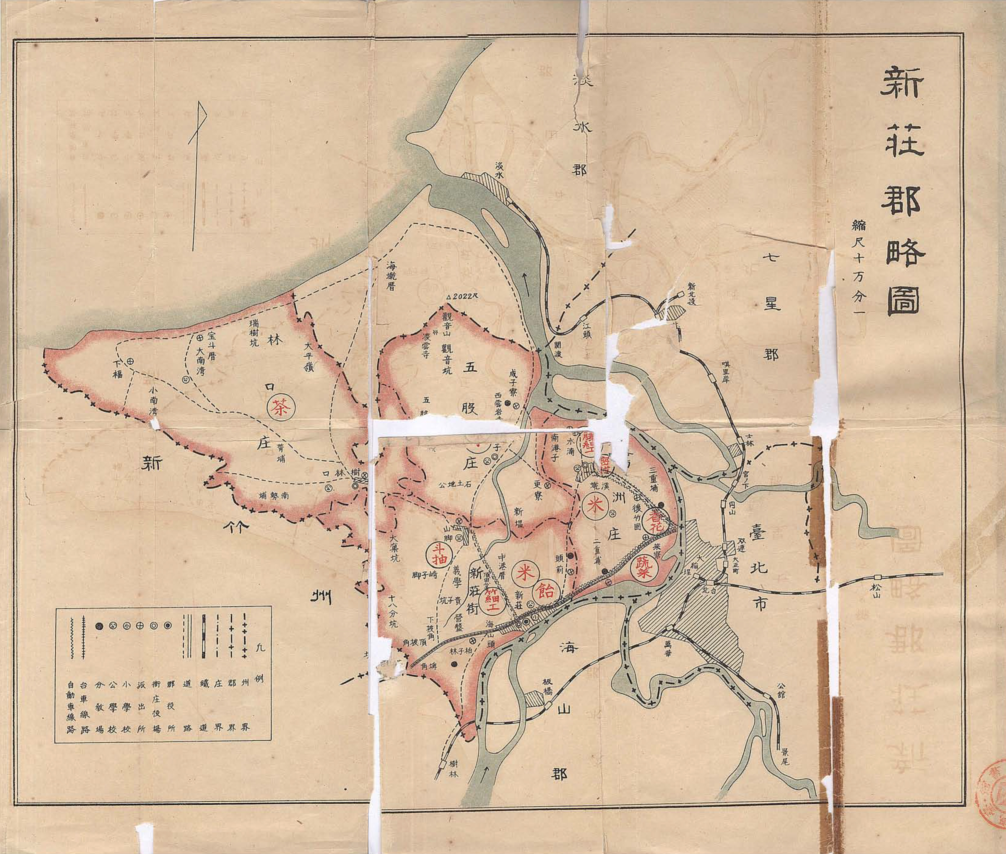 新莊郡略圖，包含新莊街、鷺洲庄、五股庄和林口庄